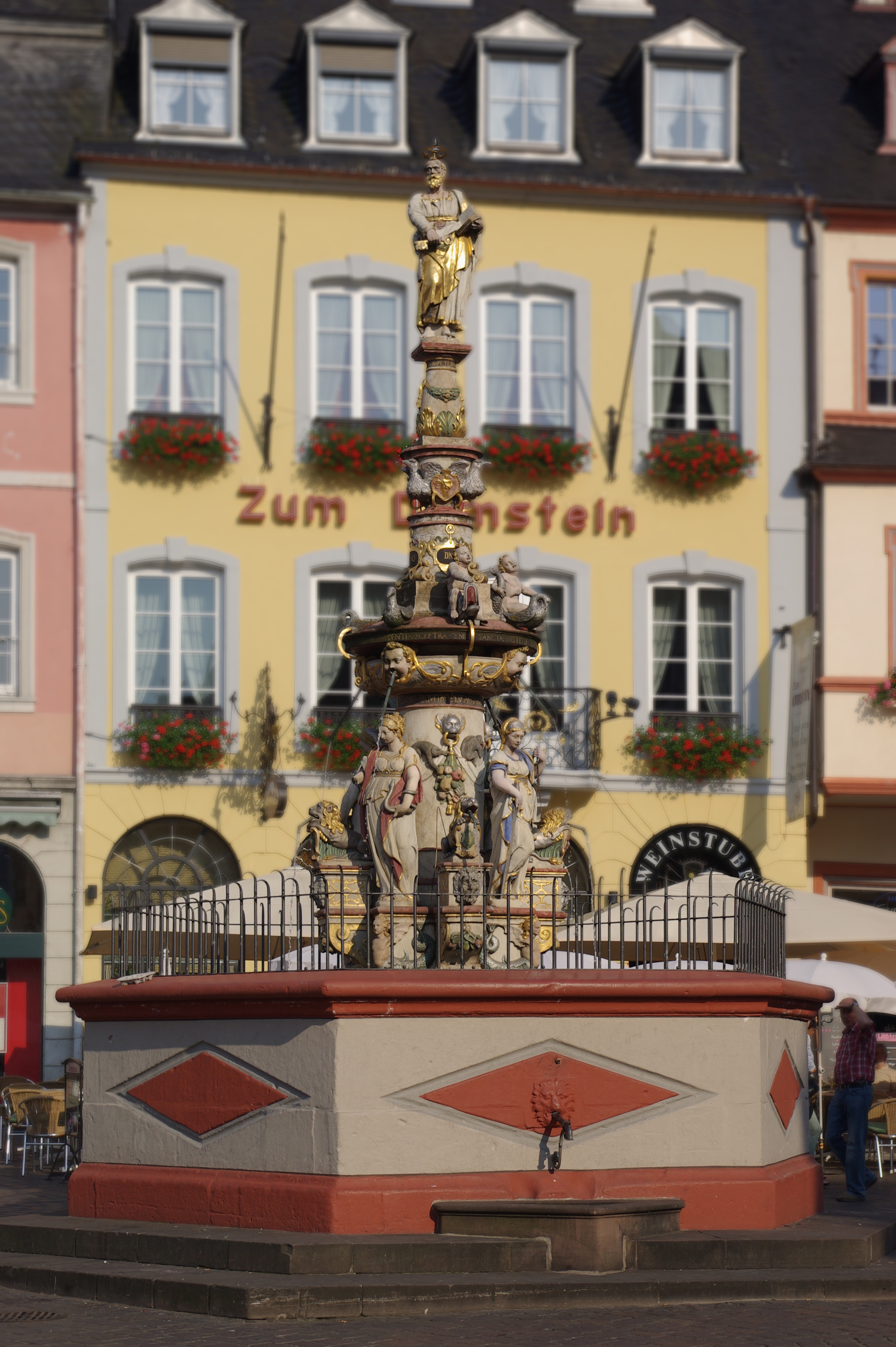 Trier, Hauptmarkt, Petrusbrunnen, manieristische Brunnenanlage, gegen 1595 von Hans Rupprecht Hoffmann